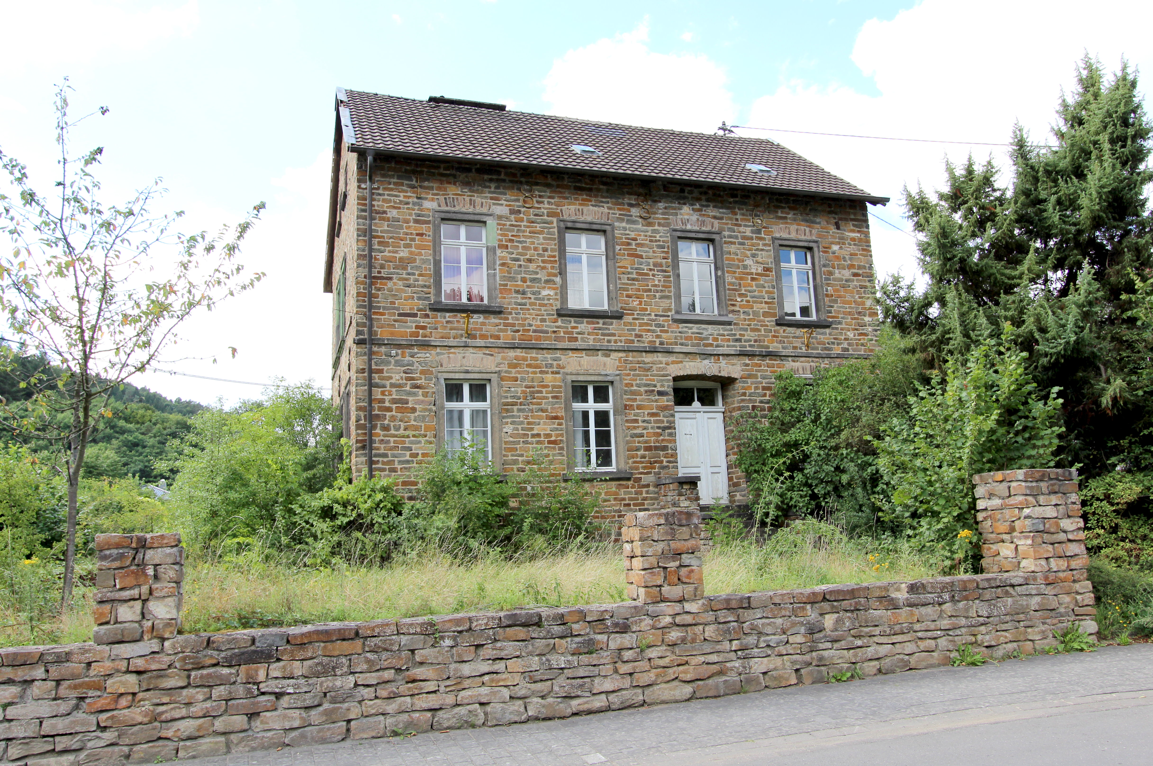 53506 Hönningen, Ortsteil Liers, Bergstraße 1. Ehemalige Schule; Bruchsteinbau, bezeichnet 1886. Aufnahme von 2017.